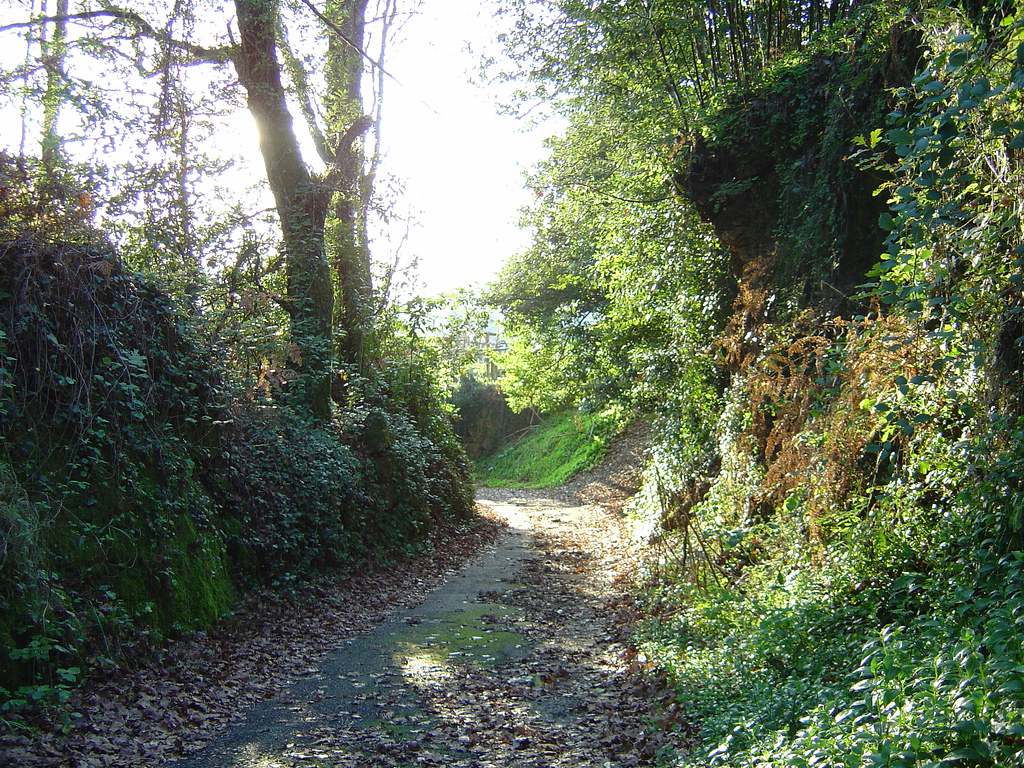 Outono nun camiño en Arbo, Pontevedra.Autumn in Galicia 1. The way home